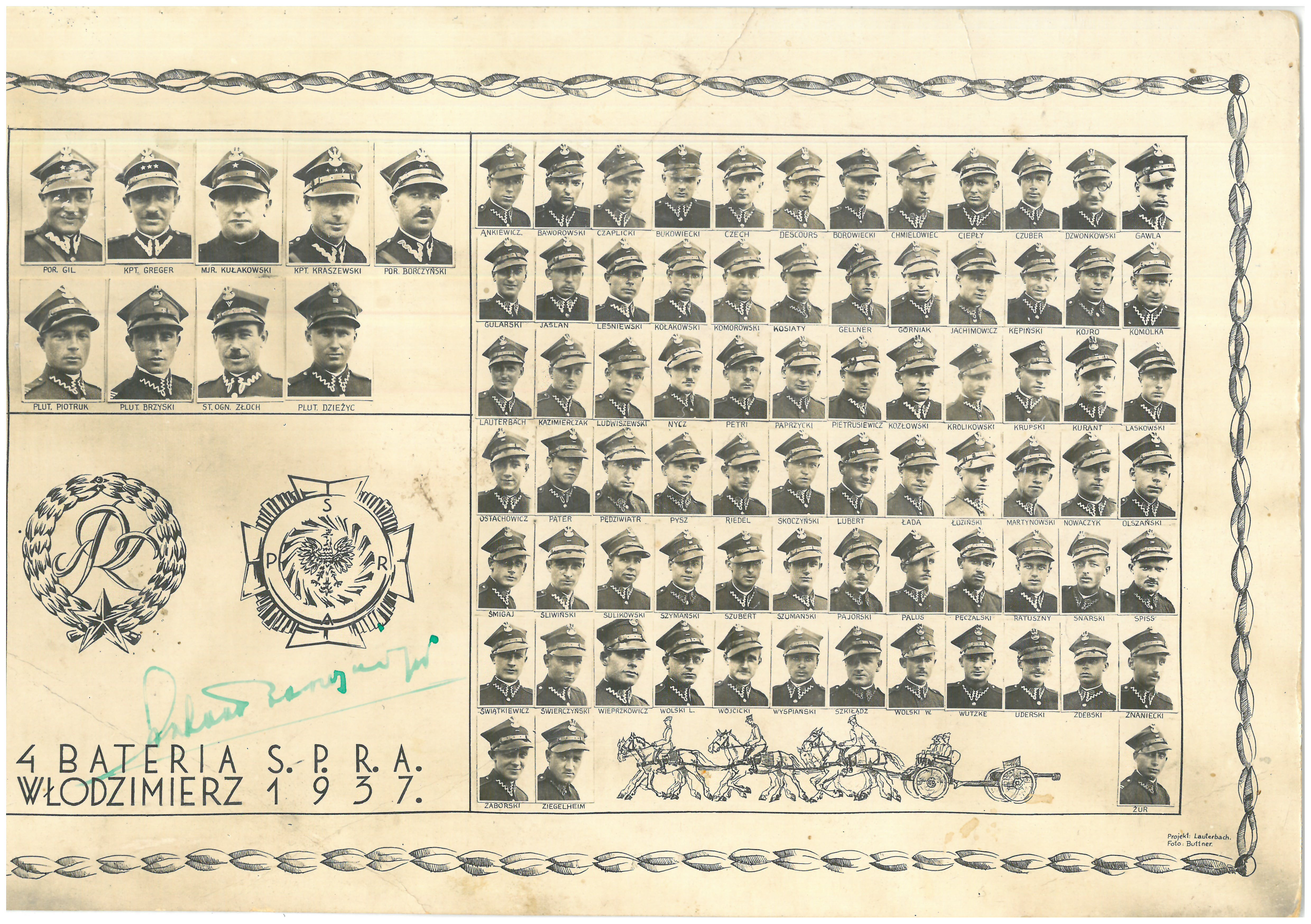 Skan oryginalnego Tableau Podchorążego Tomasza Górniaka